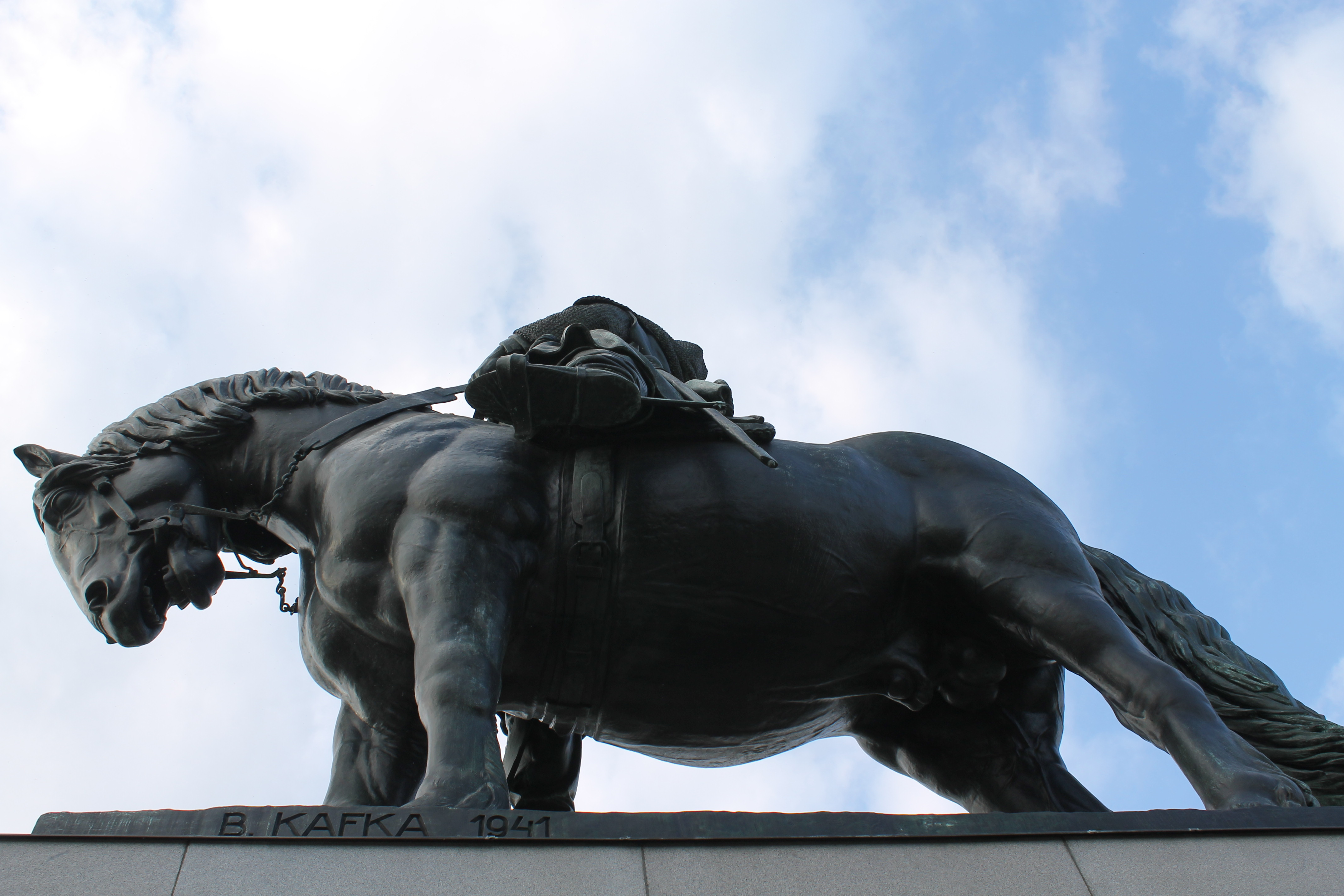 Estatua ecuestre de Jan Žižka (1941), por Bohumil Kafka. Parque Vítkov de Praga.